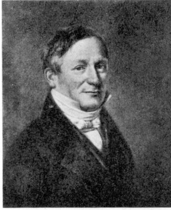 Anders Georg Levgren (1788–1857).